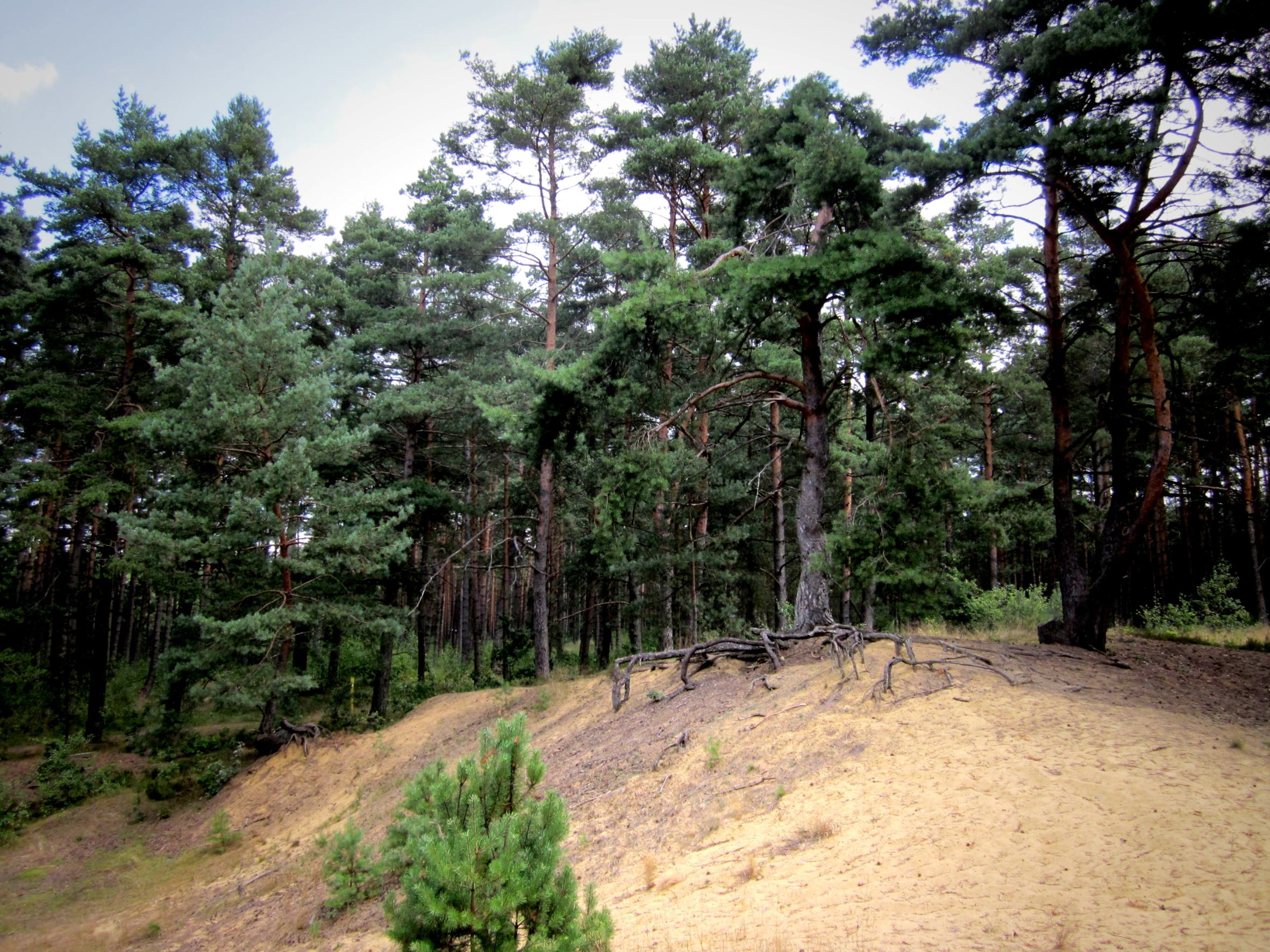 Naturschutzgebiet „Binnendünen bei Siegenburg und Offenstetten“ (NSG-00221.01, Niederbayern). Blick entlang des Dünenkamms. – Die Dünen bei Siegenburg und Offenstetten in Niederbayern enstanden aus Flugsand. Nach der letzten Eiszeit war der Boden aufgrund von spärlichem Bewuchs nicht ausreichend vor Erosion geschützt. Leichte Sandkörner wurden aus den Donauniederungen angeweht. Die bis zu zehn Meter hohen Sanddünen existieren bis heute. Bis zur Bewaldung der Dünen nach der Eiszeit waren die Dünen in ständiger Bewegung. Heute sind die Sanddünen großteils von Kiefernwäldern bedeckt. In den Dünen leben seltene, gefährdete und hoch spezialisierte Tiere und Pflanzen. Nährstoffarmut, Wassermangel und der sandige Untergrund forderten sie seit jeher und führten zu enormen Spezialisierungen.